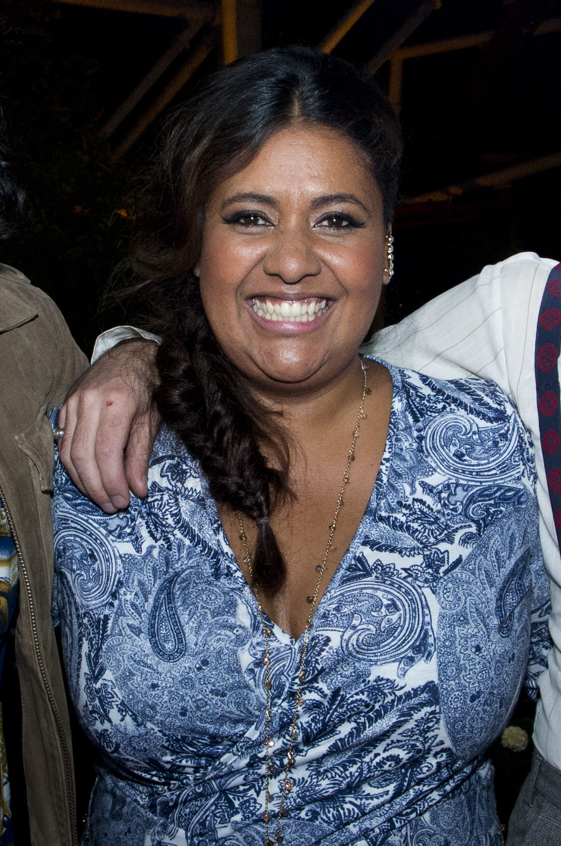 Kristin Amparo på Sommarkrysset